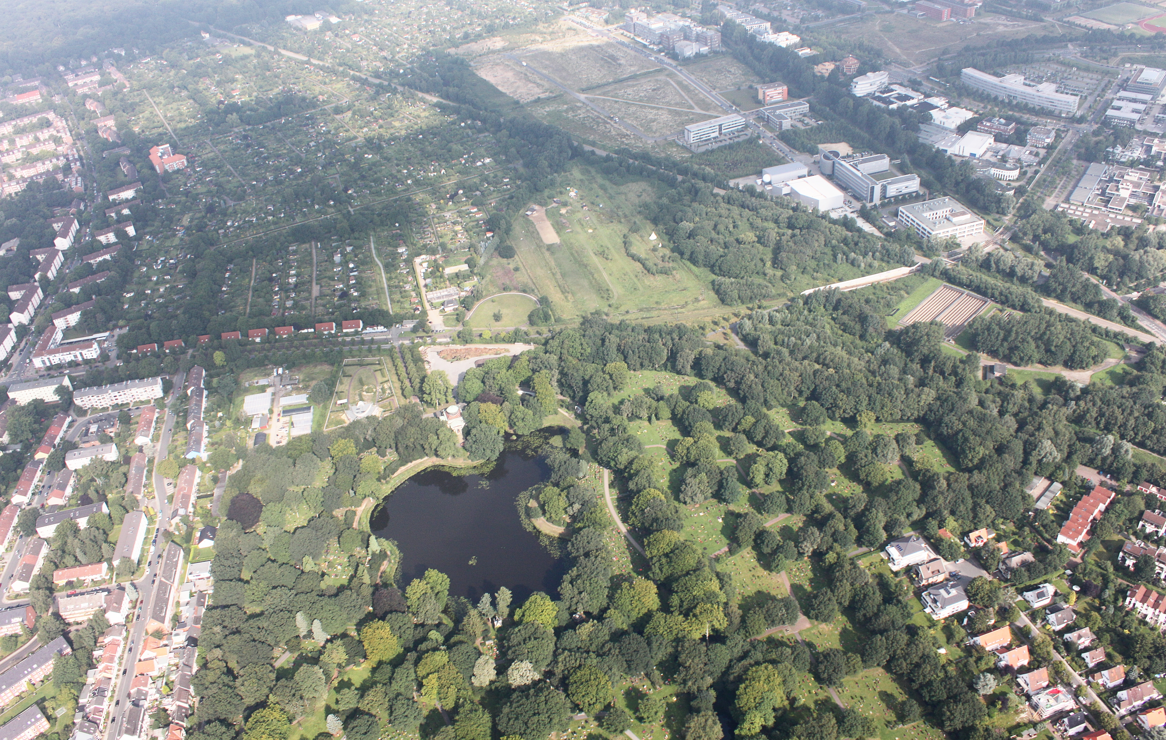 Luftaufnahme Bremen; entlang der A27; Uni Bremen; Flughöhe 500 m